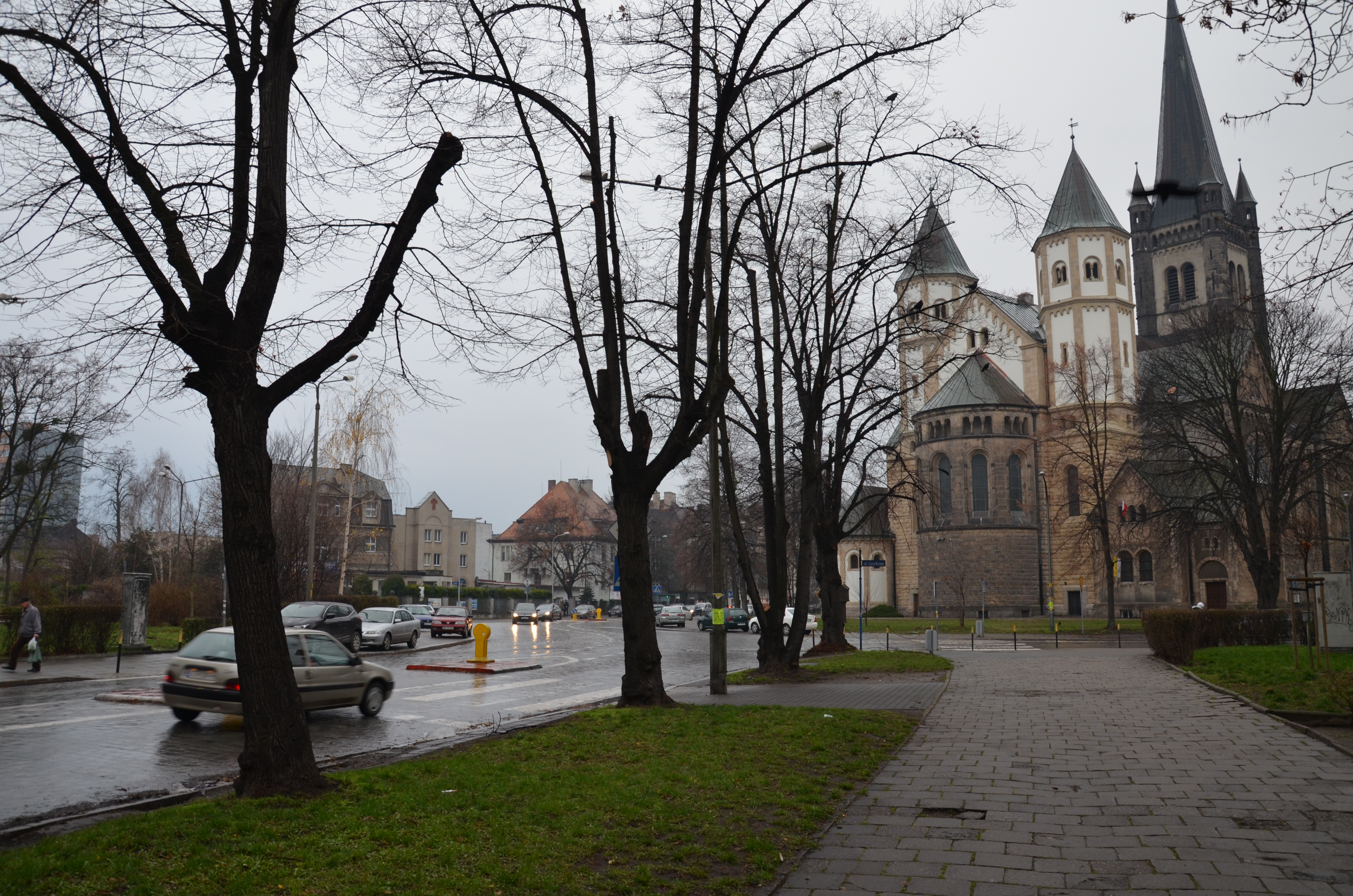 Widok w kierunku zachodnim